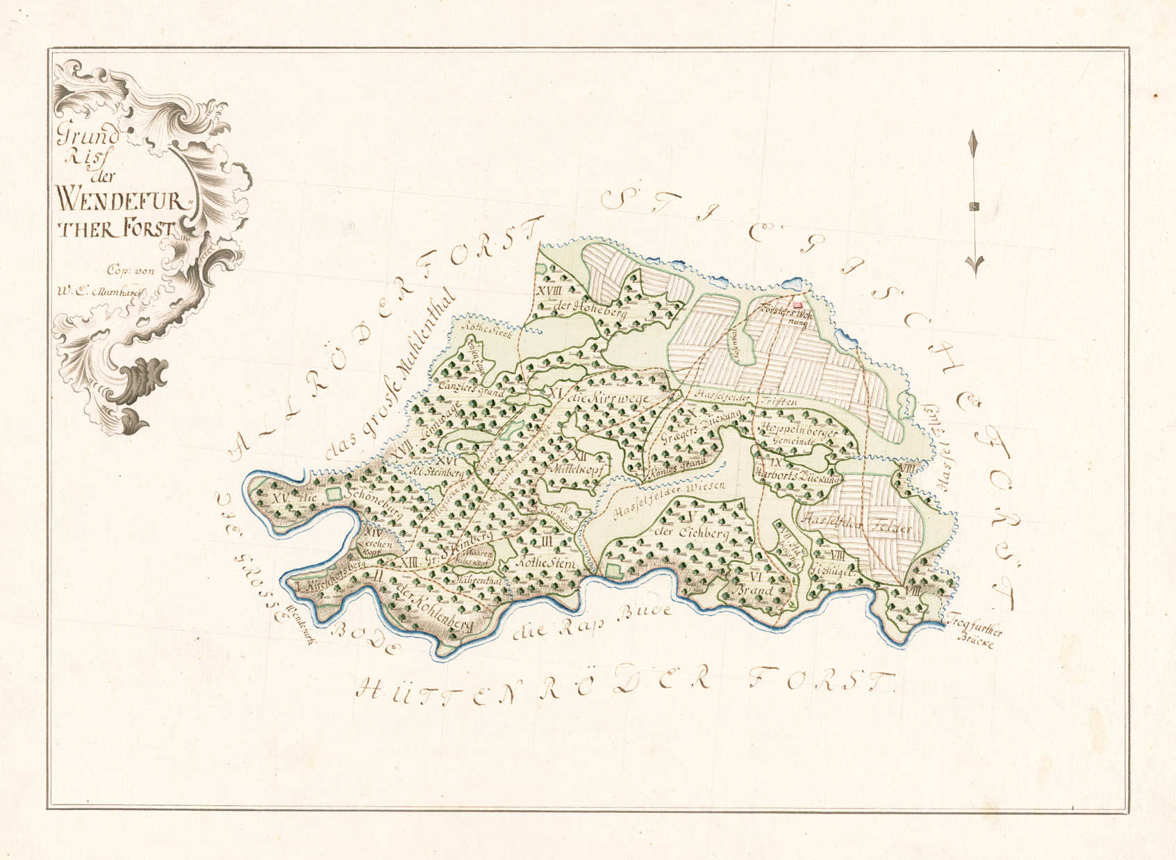 Grund Riss der Wendefurther Forst. Handzeichnung, grenzkoloriert, flächenkoloriert, teilweise zeichenkoloriert; 32 x 23 cm, Süden ist oben, Richtungspfeil oben rechts. Titelkartusche oben links. ca. 1:38.000